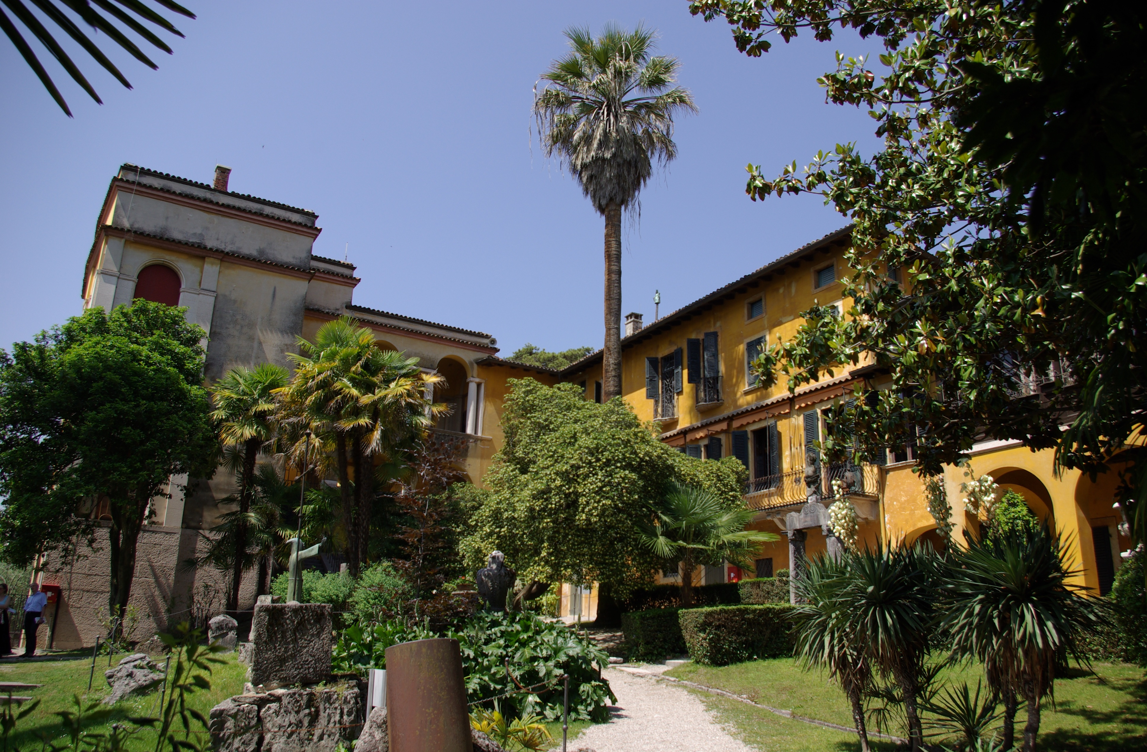 Villa von Gabriele D’Annunzio im Vittoriale degli italiani in Gardone Riviera